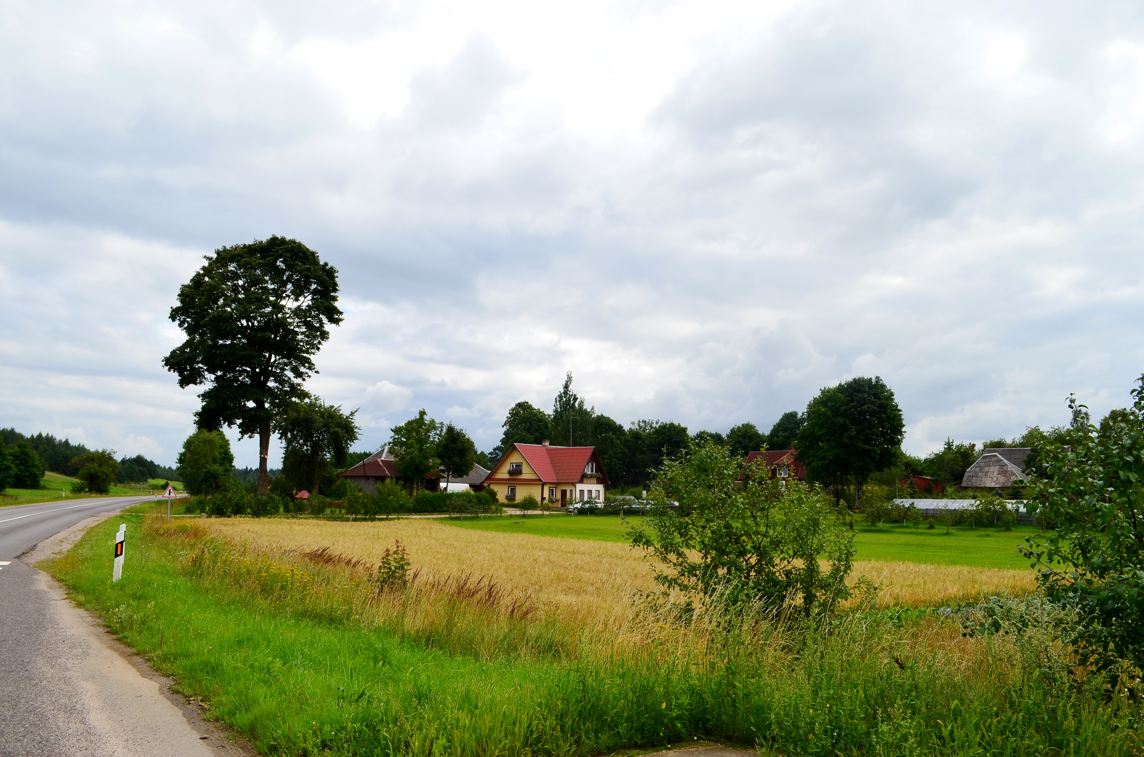 Maksimonių k., Vidiškių sen., Ignalinos raj.